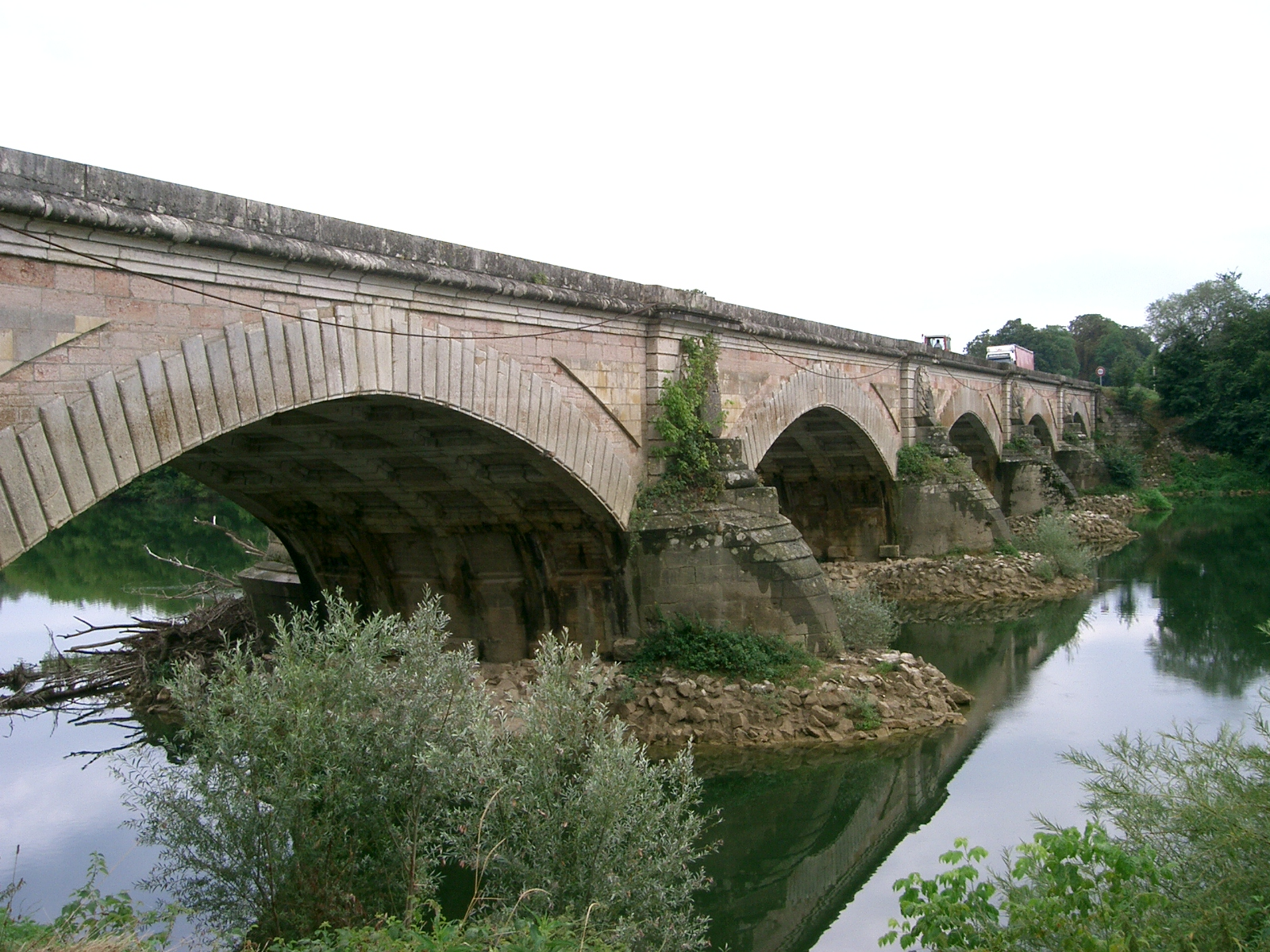 Pont de Navilly sur le Doubs (71) - fin 18°s self made PRA